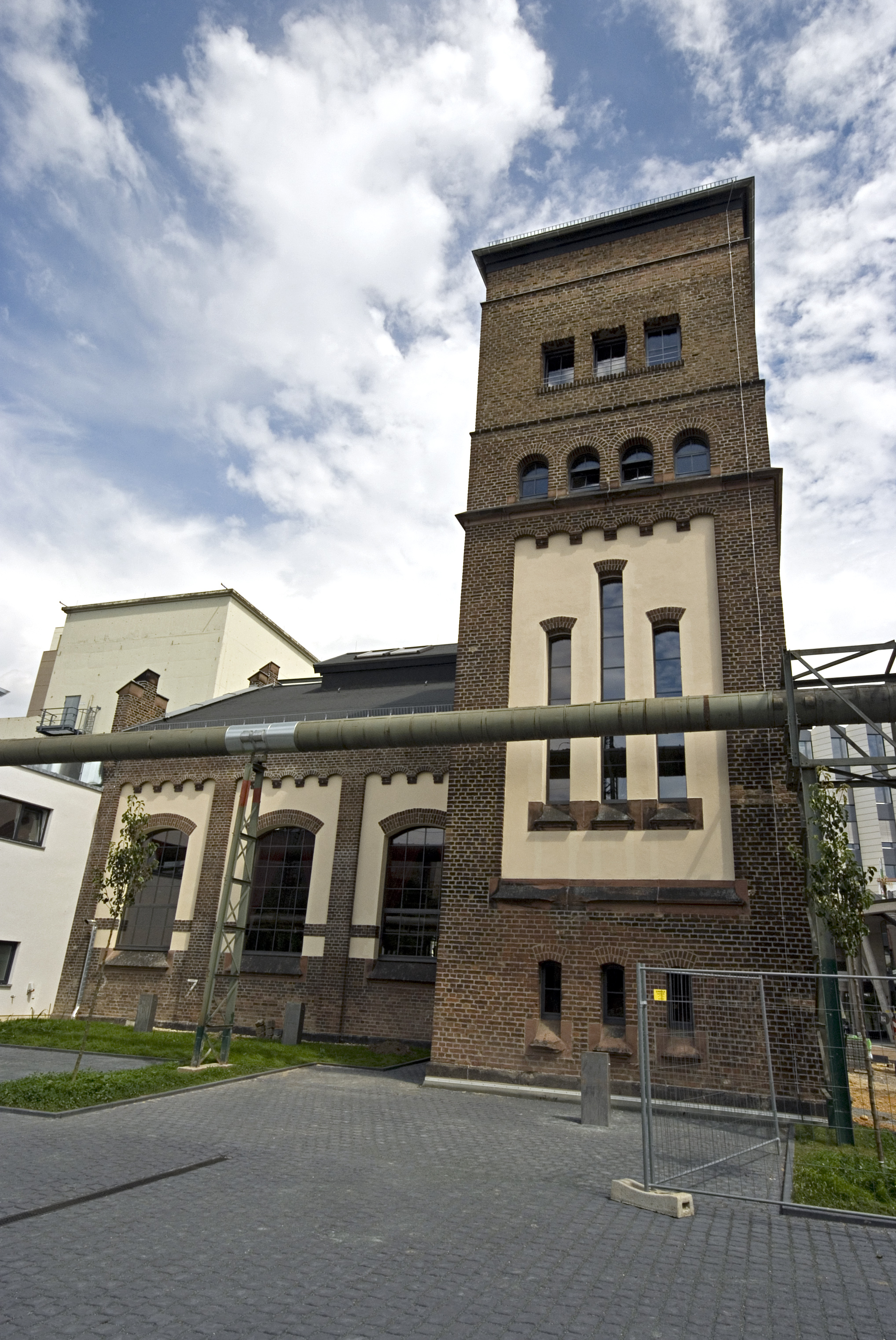 Druckwasserwerk